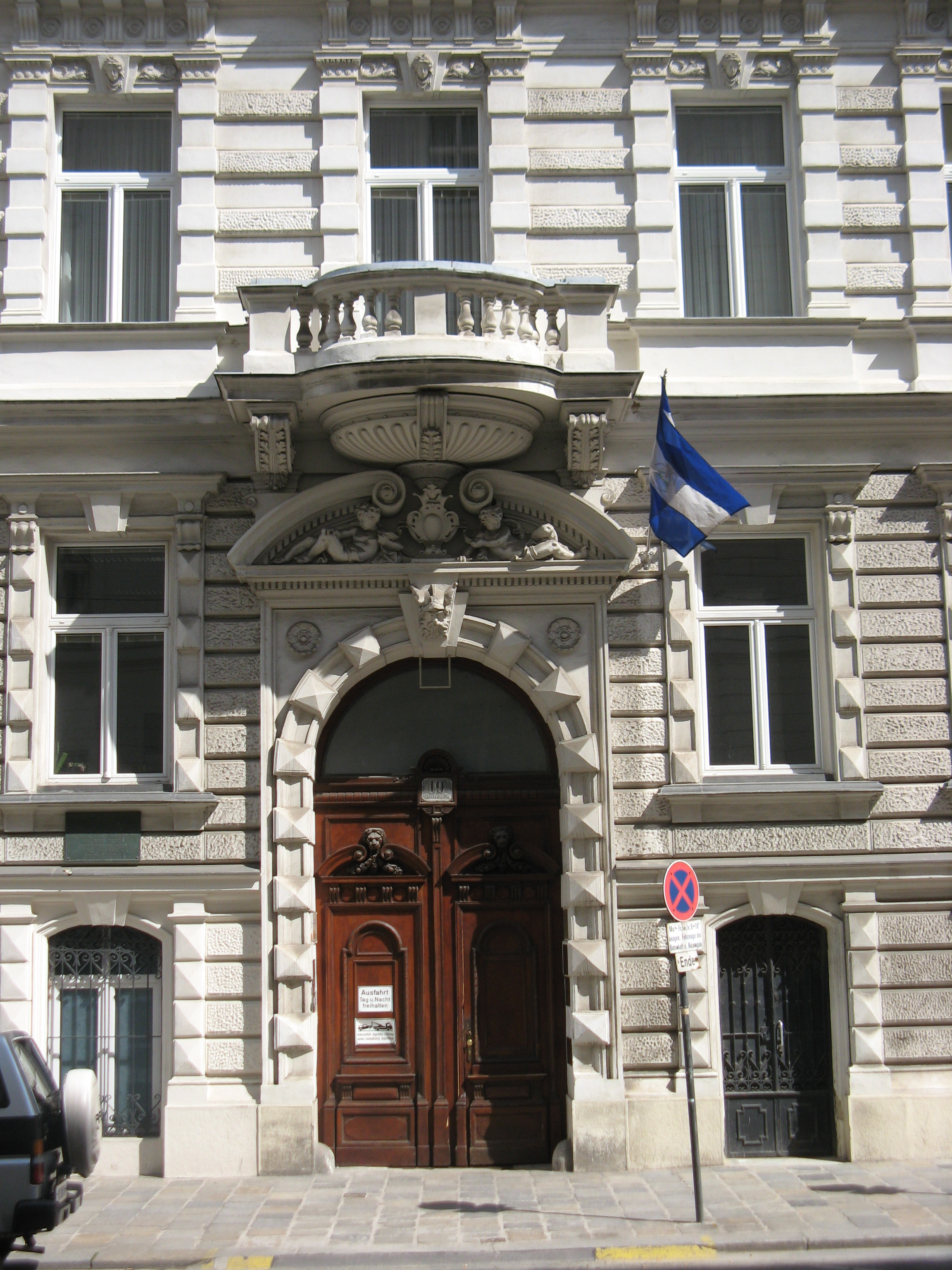 Haus (1883-84) von Wilhelm Stiassny, Ebendorferstraße 10, Wien-Innere Stadt